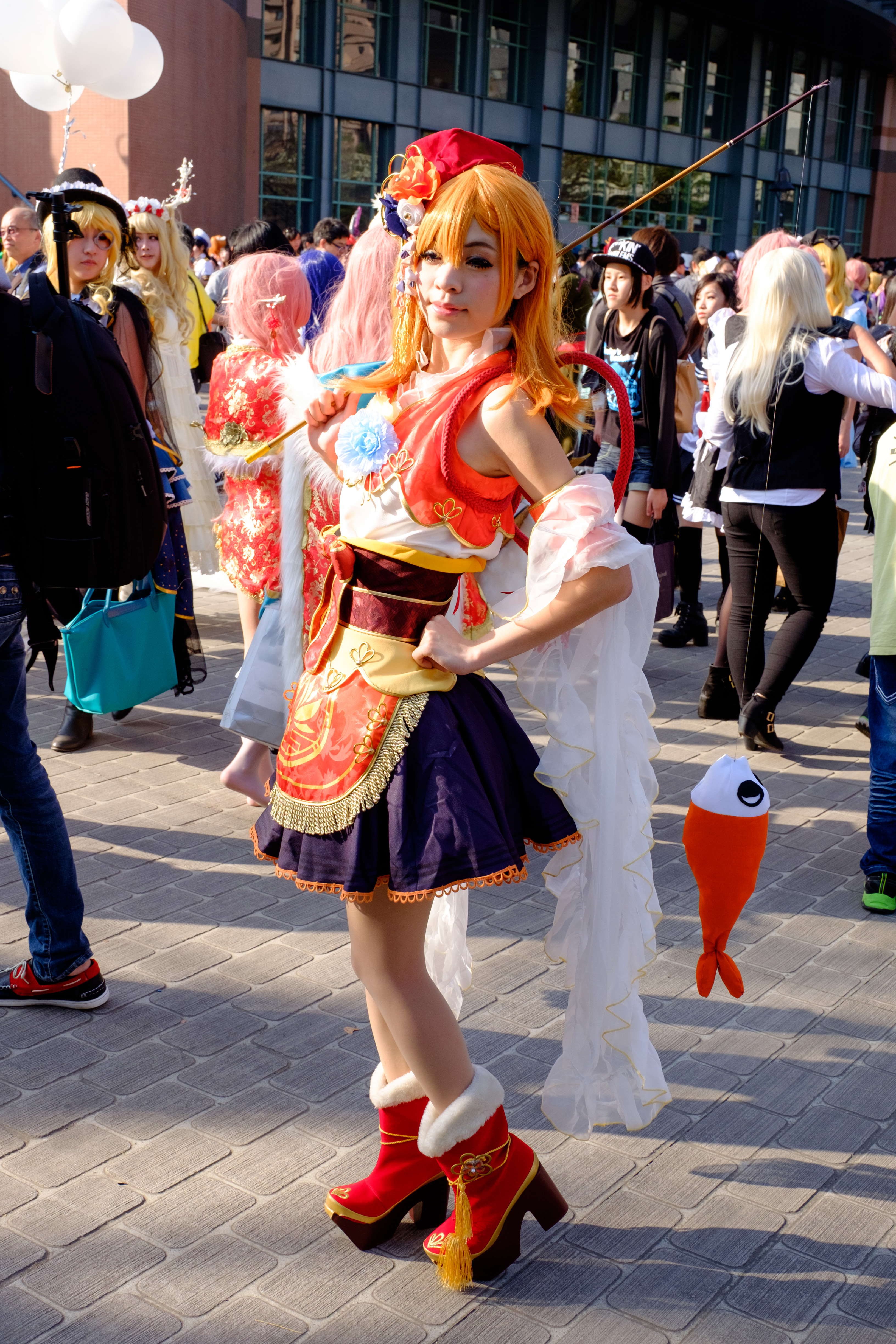 CWT42第一日下午，＜ラブライブ＞高坂穗乃果·七福神覺醒編惠比壽cosplayer。